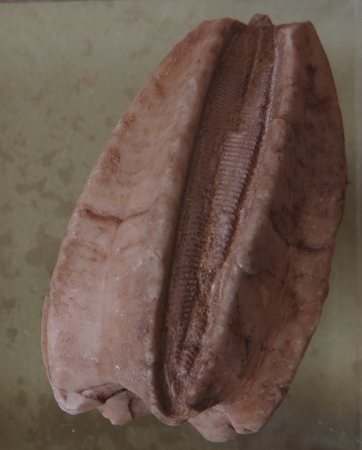 Fossil of Schizoblastus - Took the picture at Natural History Museum, Bonn University